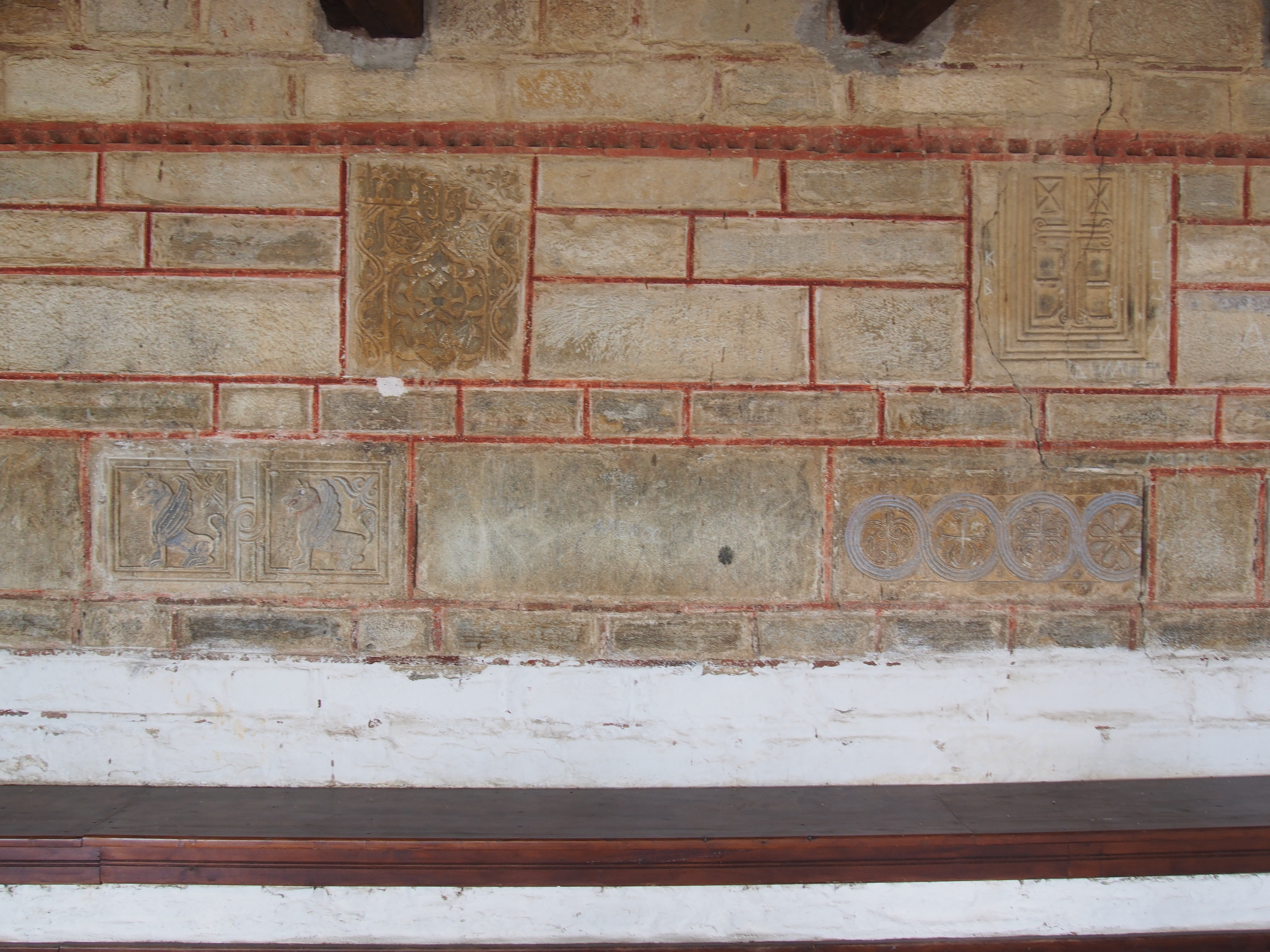 Ναός Κοιμήσεως της Θεοτόκου Μακρυνίτσας«Ναός Κοιμήσεως της Θεοτόκου Μακρυνίτσας»